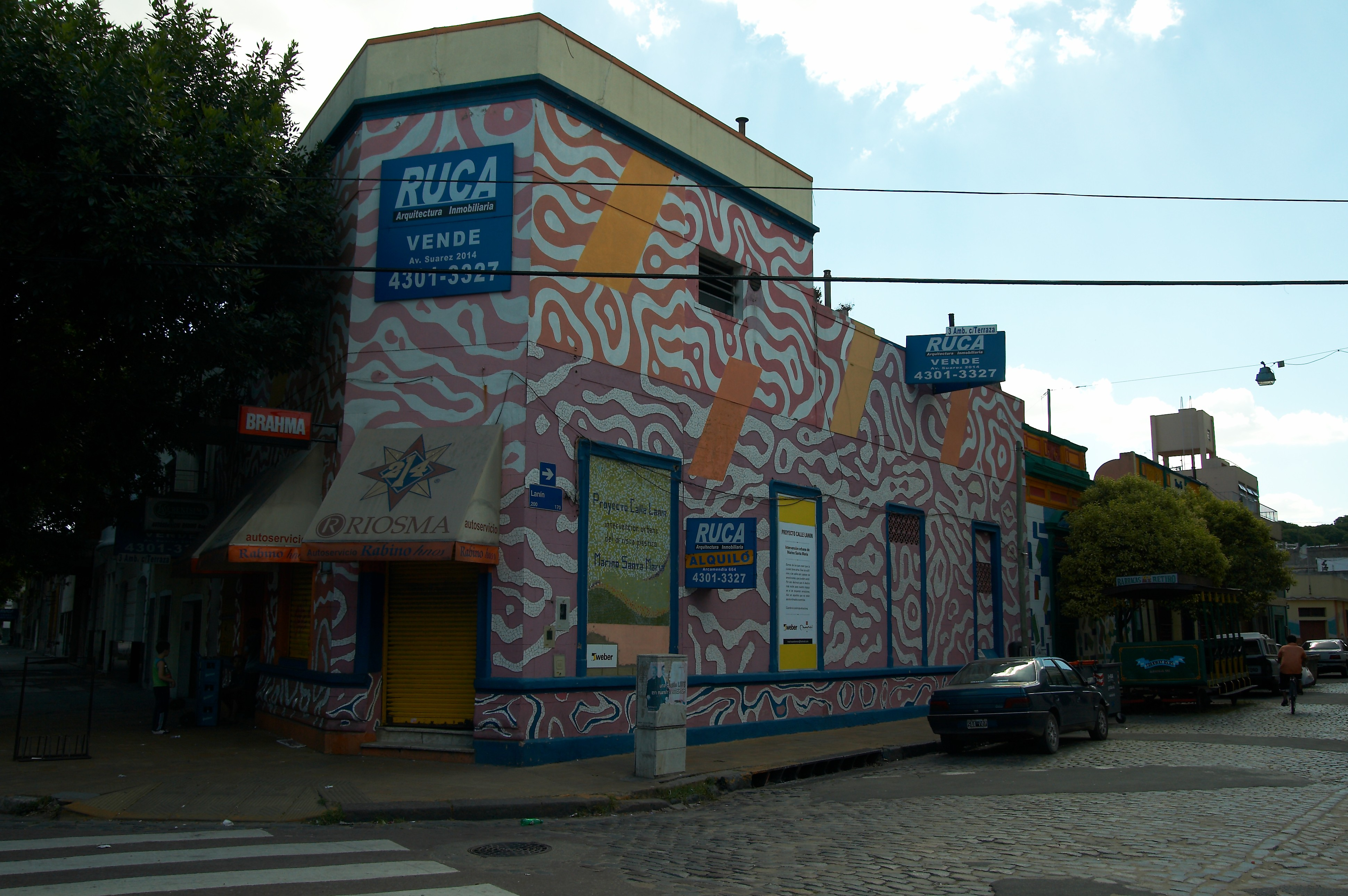 Calle Lanín, barrio de Barracas, Buenos Aires, Argentina.